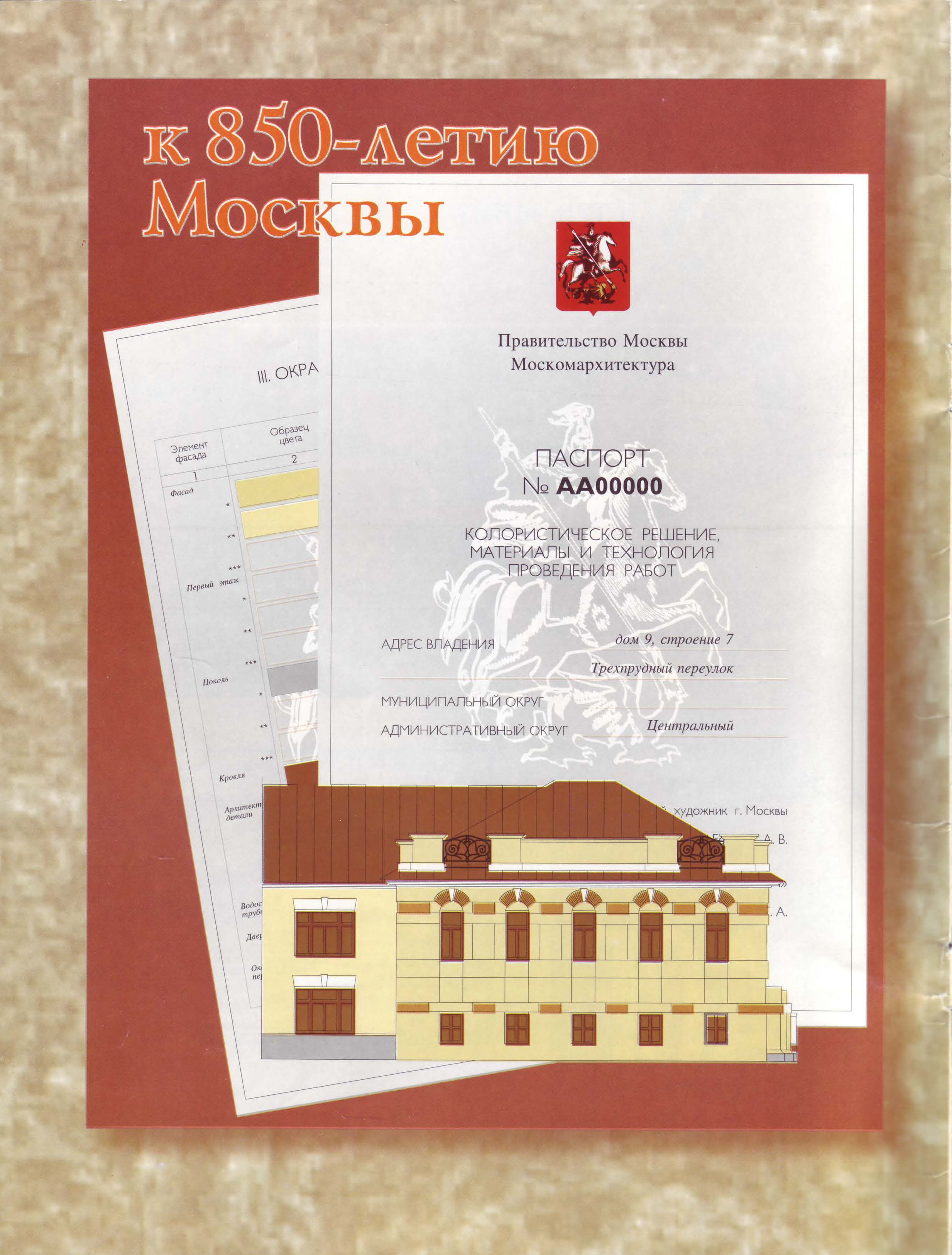 Рисунок с проектом бланка колористического паспорта и макетом цветового решения фасада